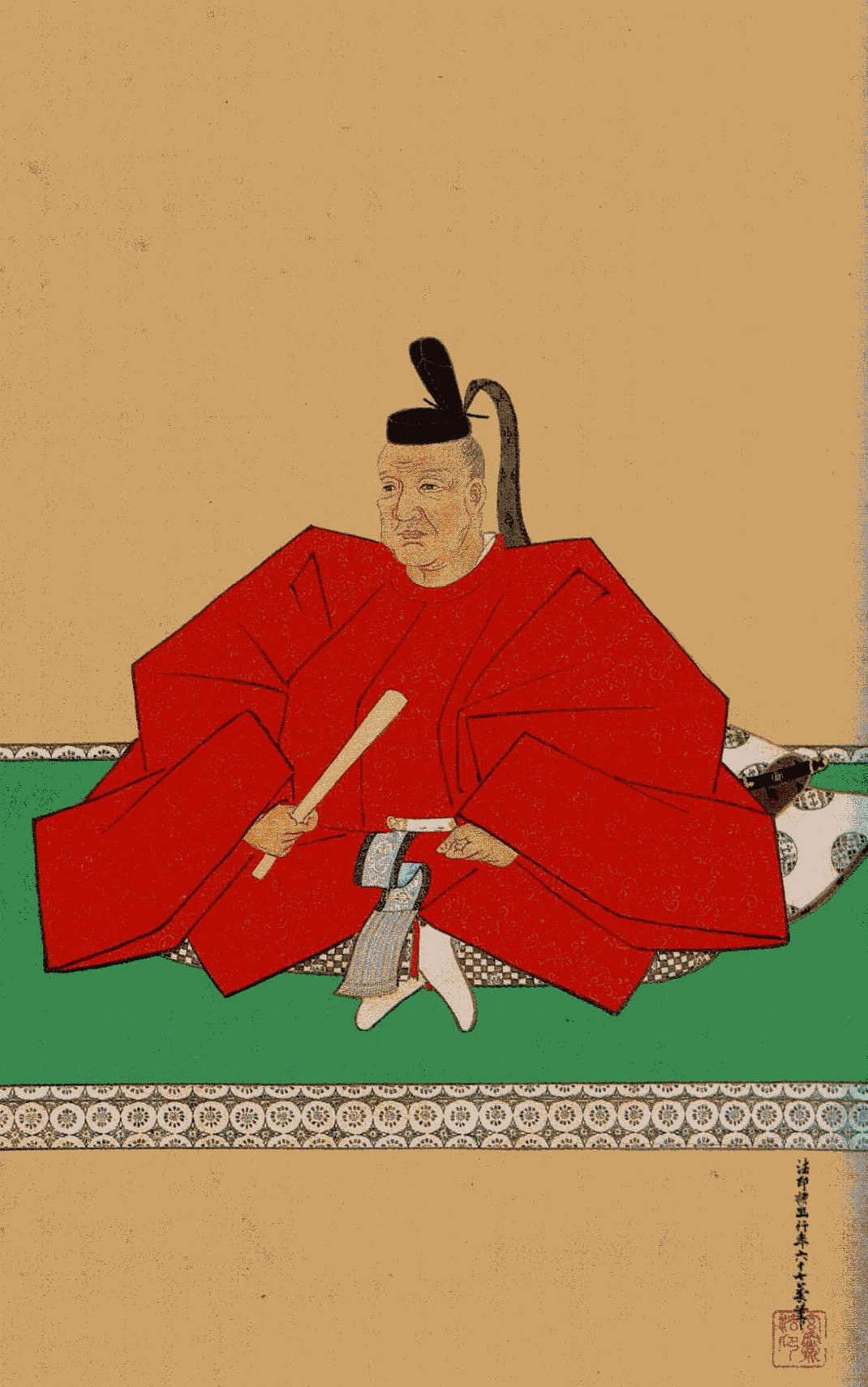 小出吉親像